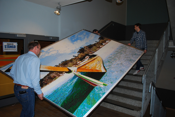 Världens största pärlplatta innehåller 316.800 pärlor. Den byggdes färdigt i november 2008 av ungdomar på Fryshusets Gymnasium i Stockholm. Tavlans storlek: 2,40 x 3,30m.